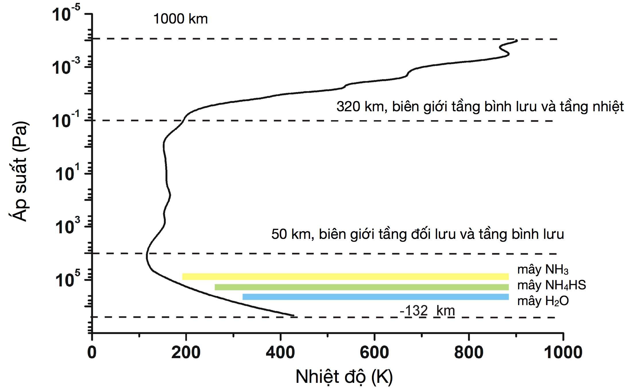 Translate from